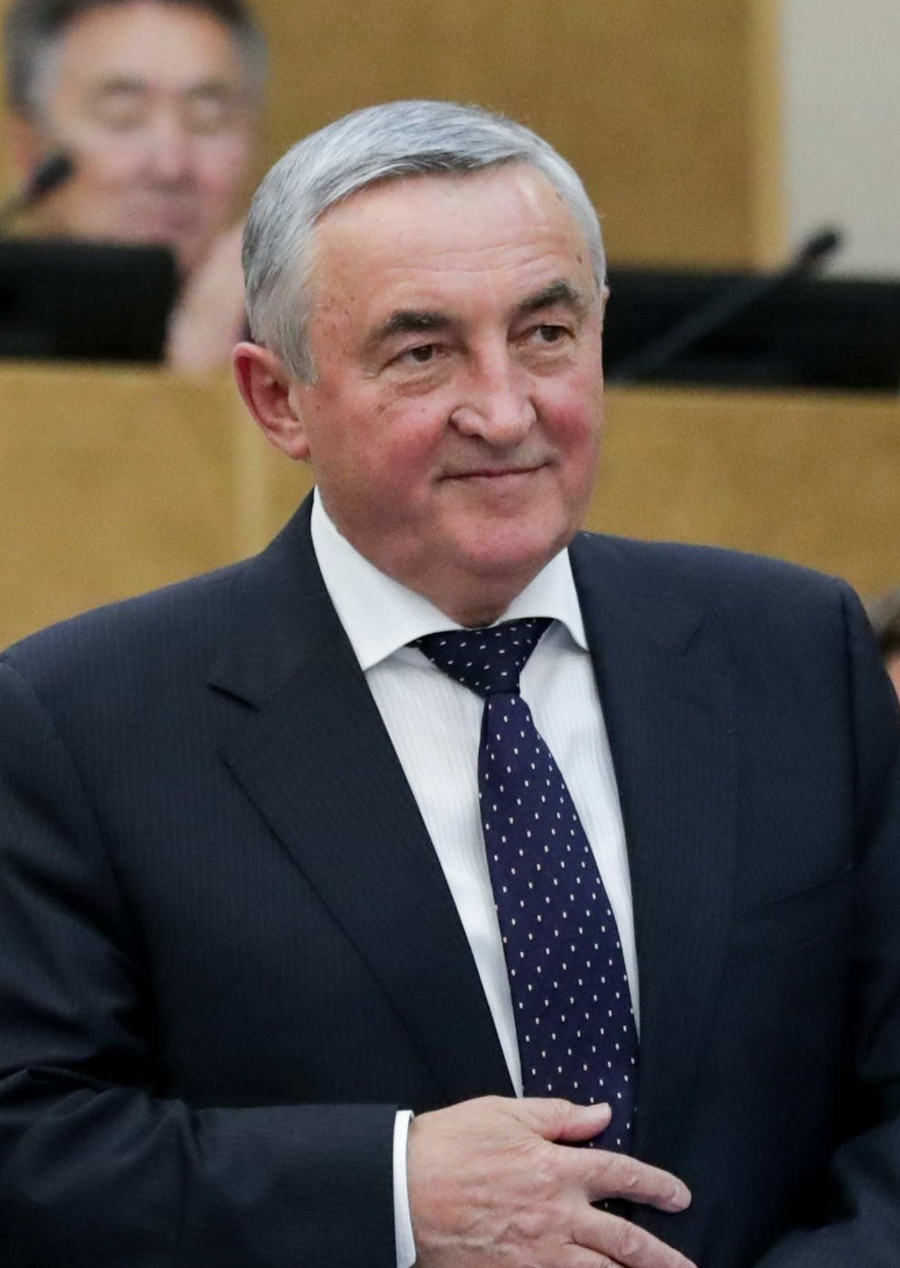 Депутат Государственной думы Юрий Иванович Бобрышев